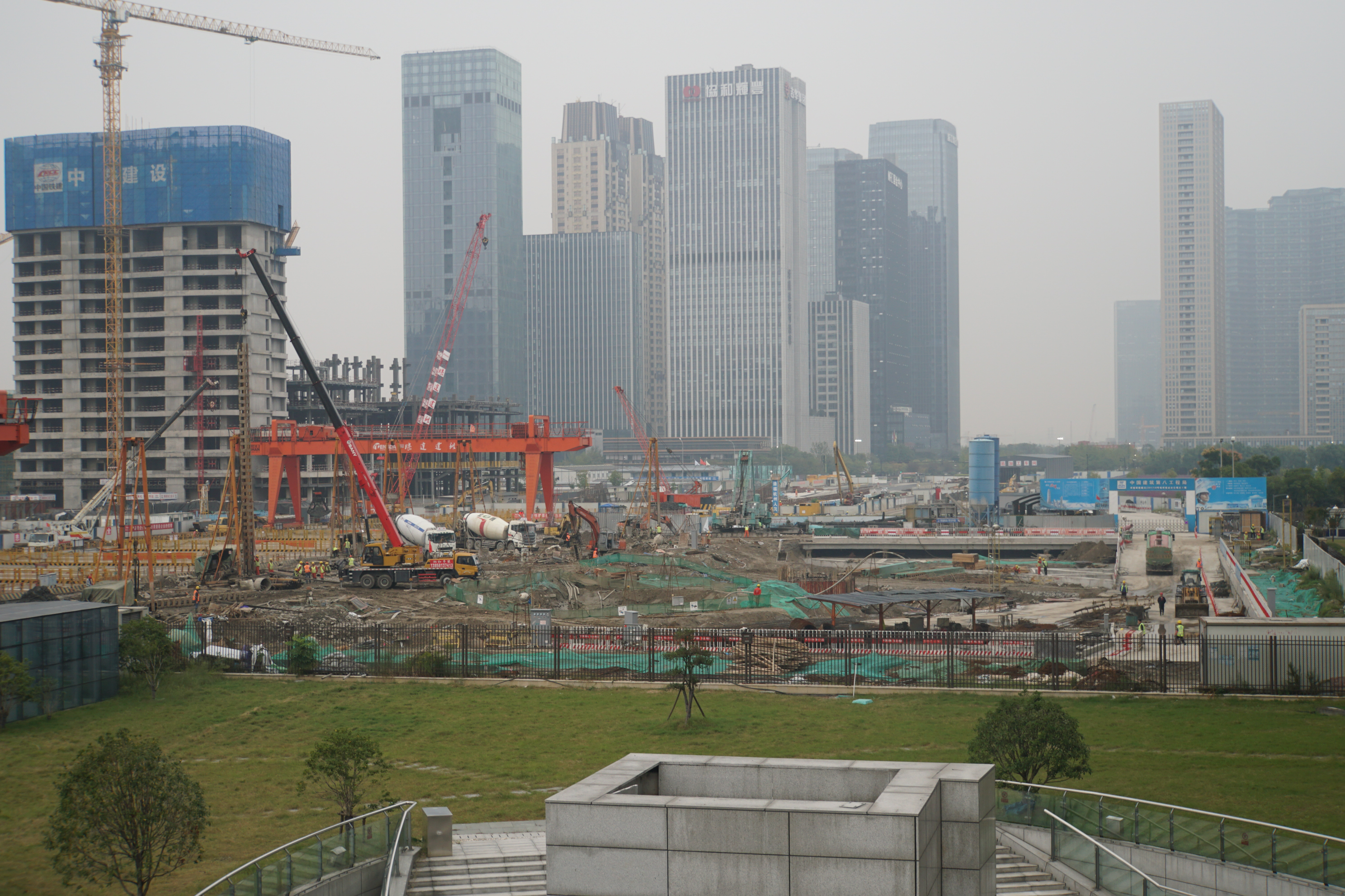 博览中心站工地，2018年10月